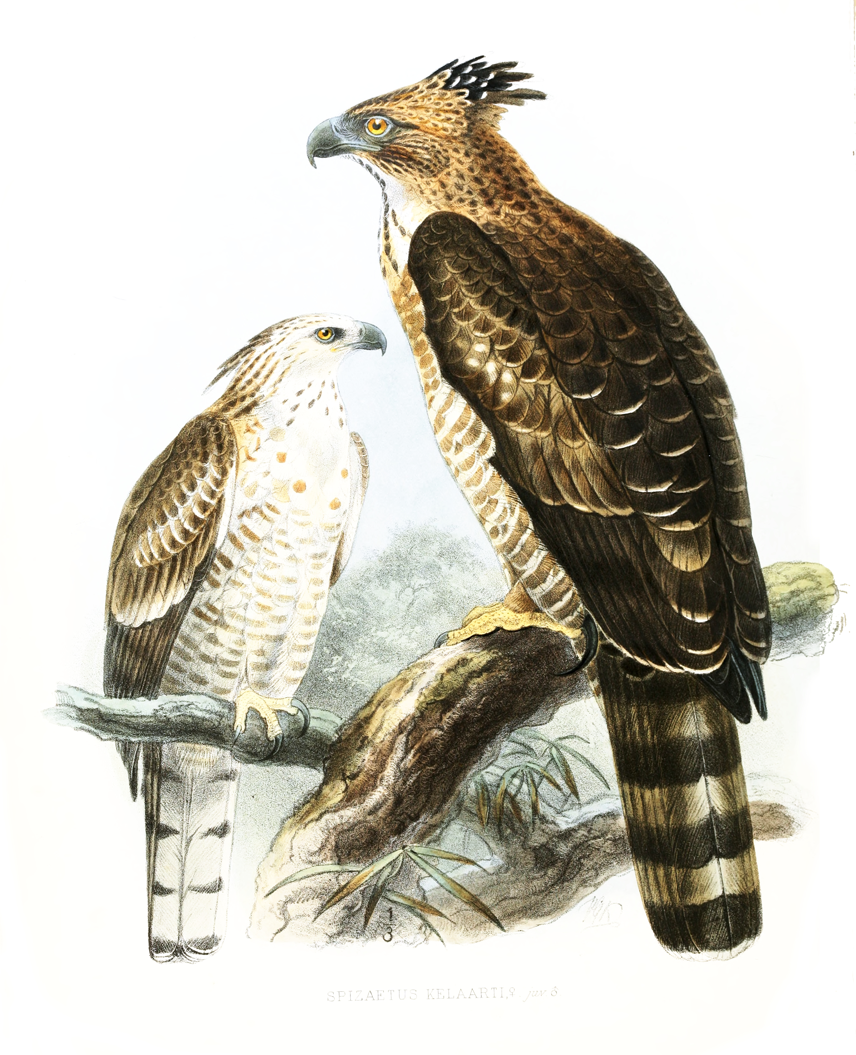 Spizaetus/ Nisaetus nipalensis kelaarti